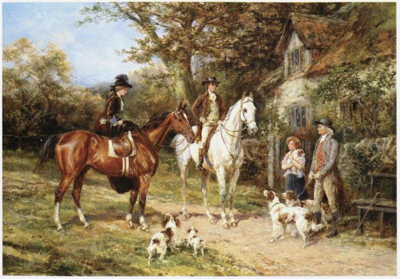 The Prized Puppy, Ueleg op Canevas, Originalmooss: 61 x 85 cm